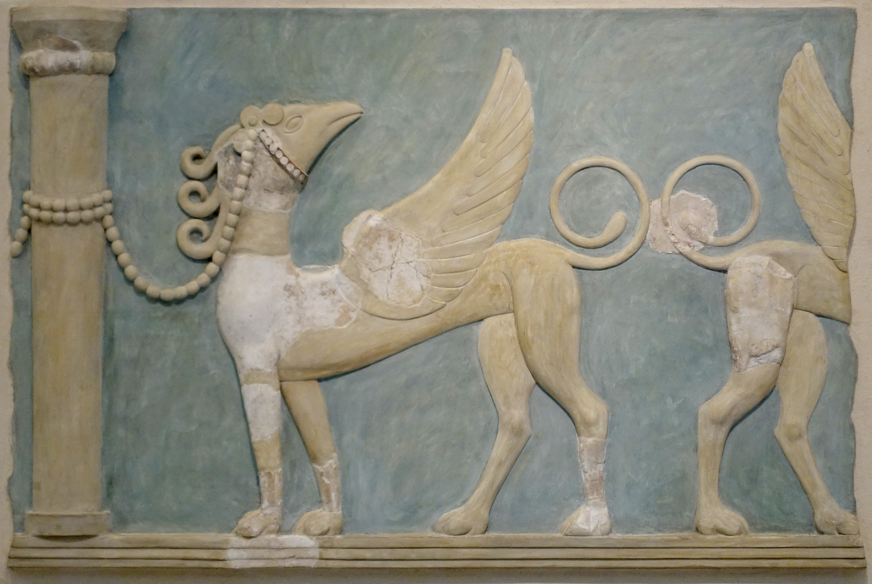 Hochrelief des Greifenfreskos aus der großen östlichen Halle des Palastes von Knossos (1600–1450 v. Chr.), ausgestellt im Archäologischen Museum Iraklio, Kreta, Griechenland